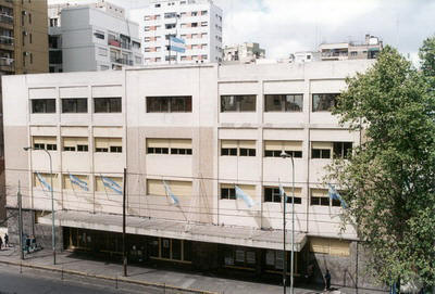 Frente del Instituto Damaso Centeno.